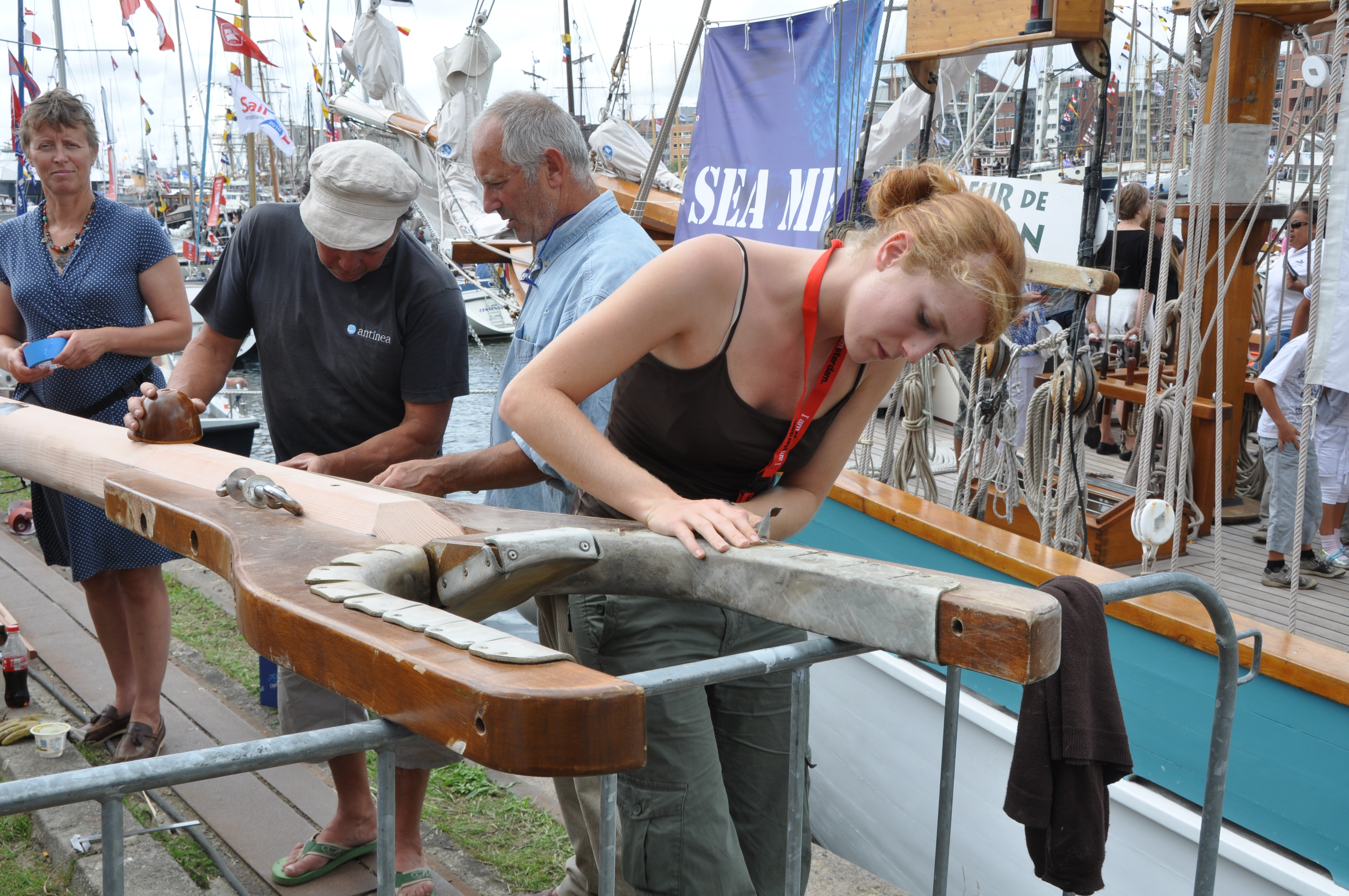 De FLEUR DE PASSION op Sail Amaterdam 2010